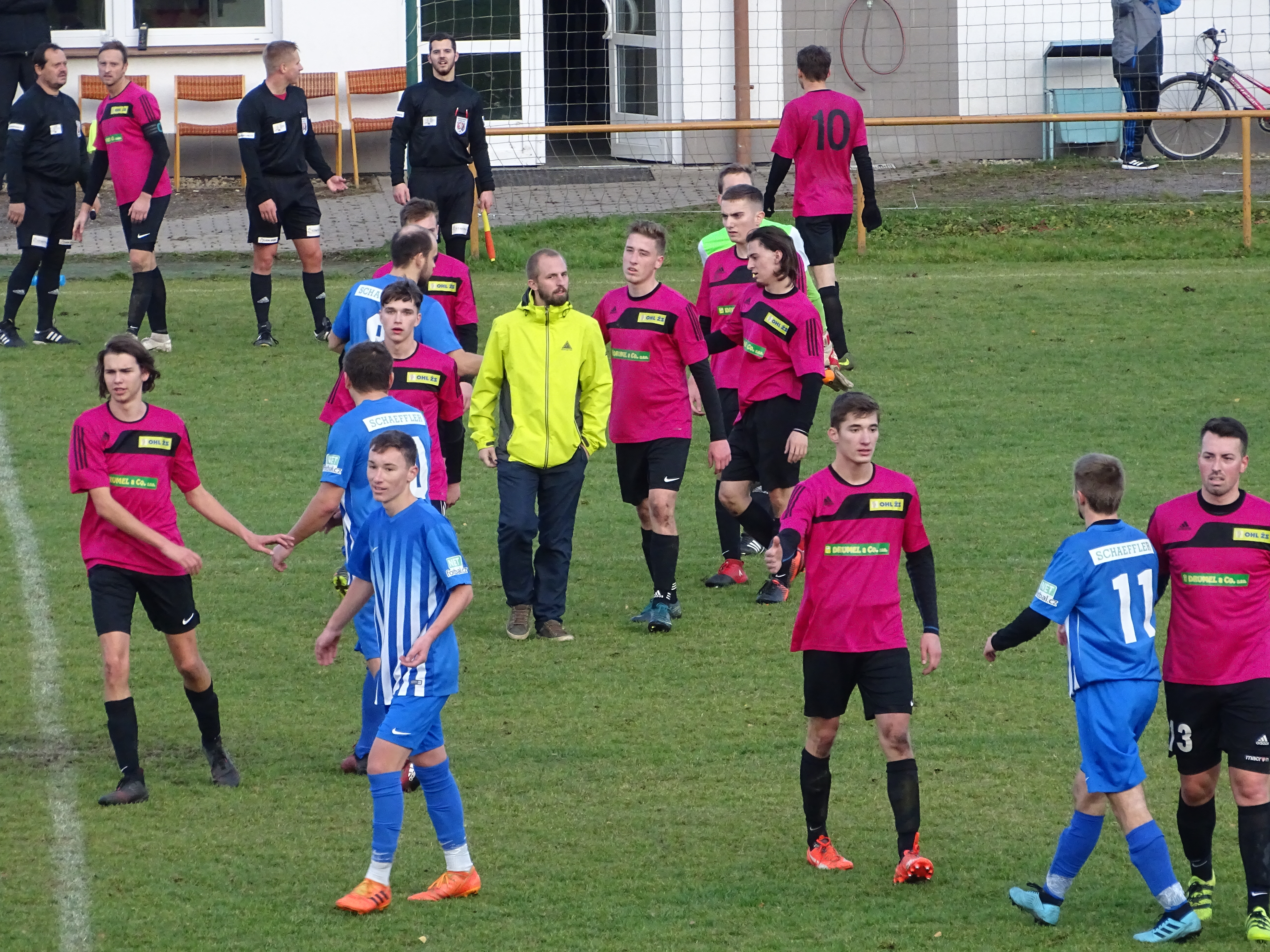 hráči FK Česká Třebová